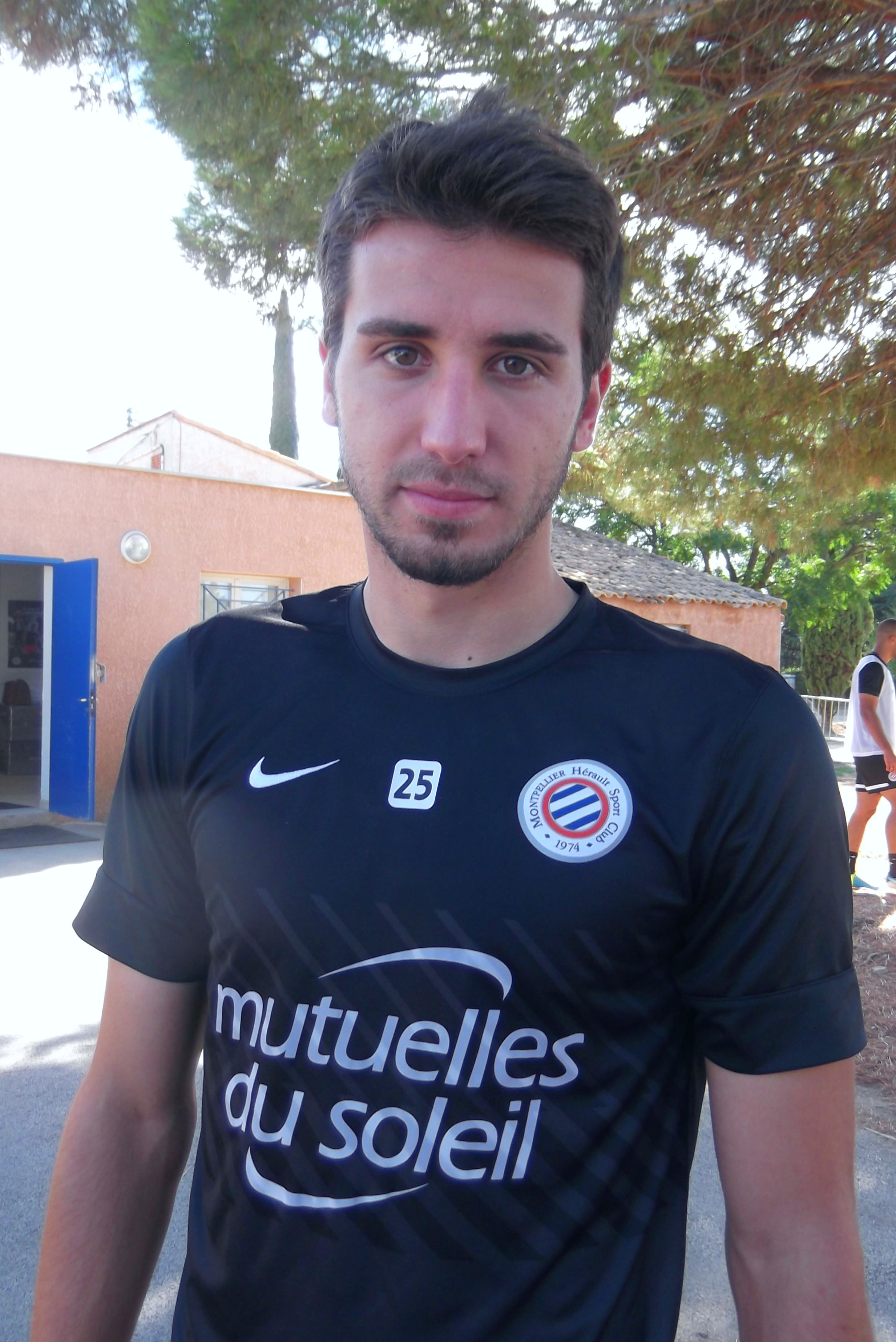 Mathieu Deplagne, 2013.